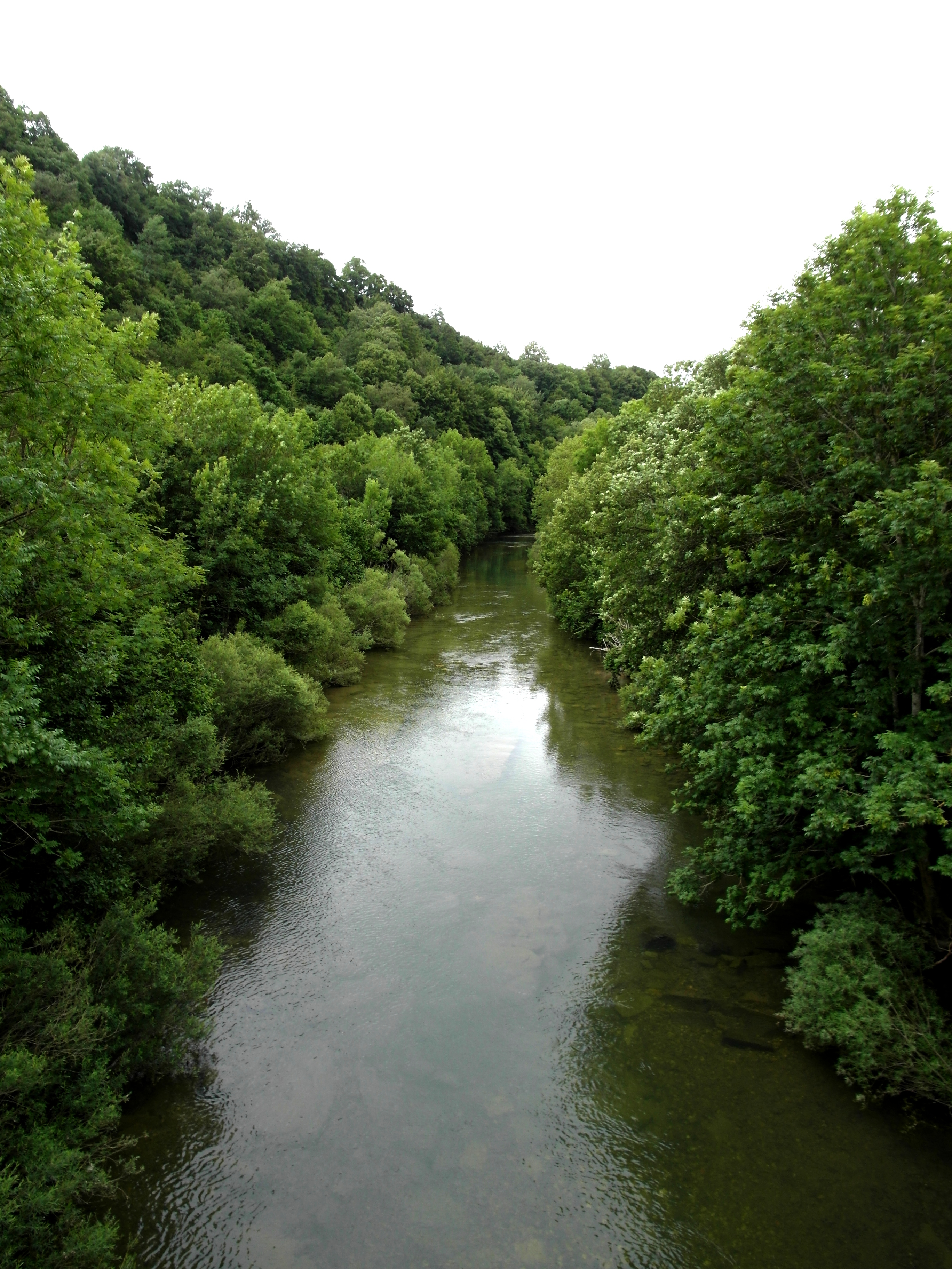 Río Irati cerca de Orbara.